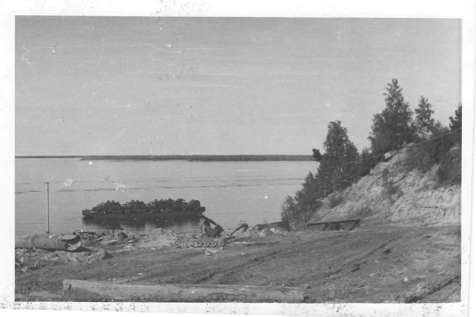 Перегребне. Тимчасовий причал на річці Об після шторму. 1979 рік.